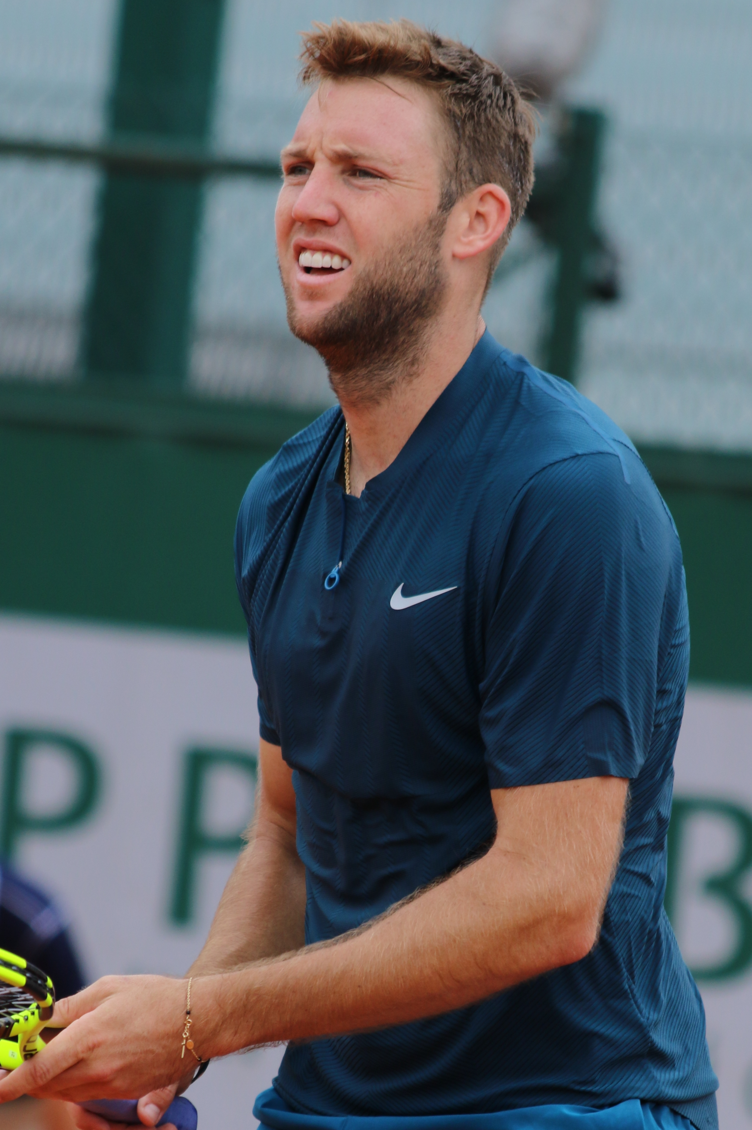 Sock RG18 (14)